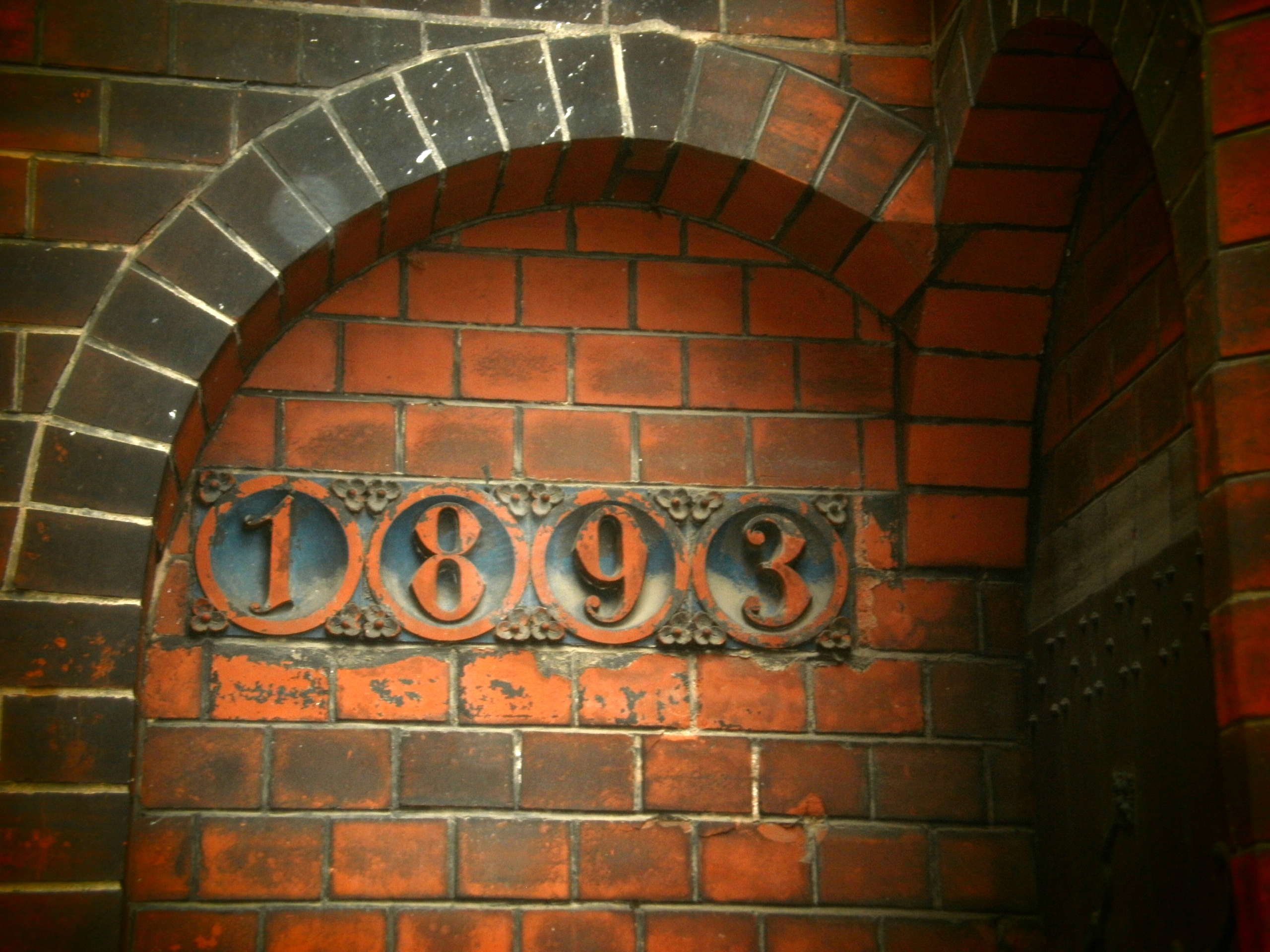 Legnica, kościół par. p.w. śś. Piotra i Pawła, ob. katedra, 1333-1390, 1863-1894